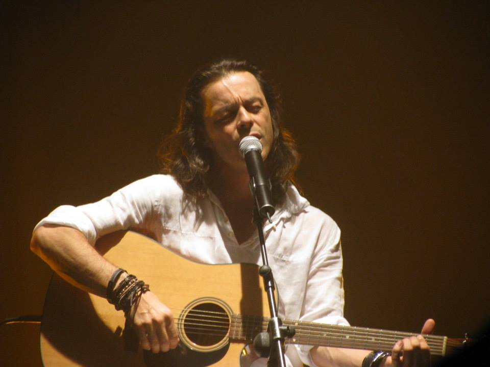 Nuno Resende à Avignon en juillet 2013 au théâtre du Rouge Gorge